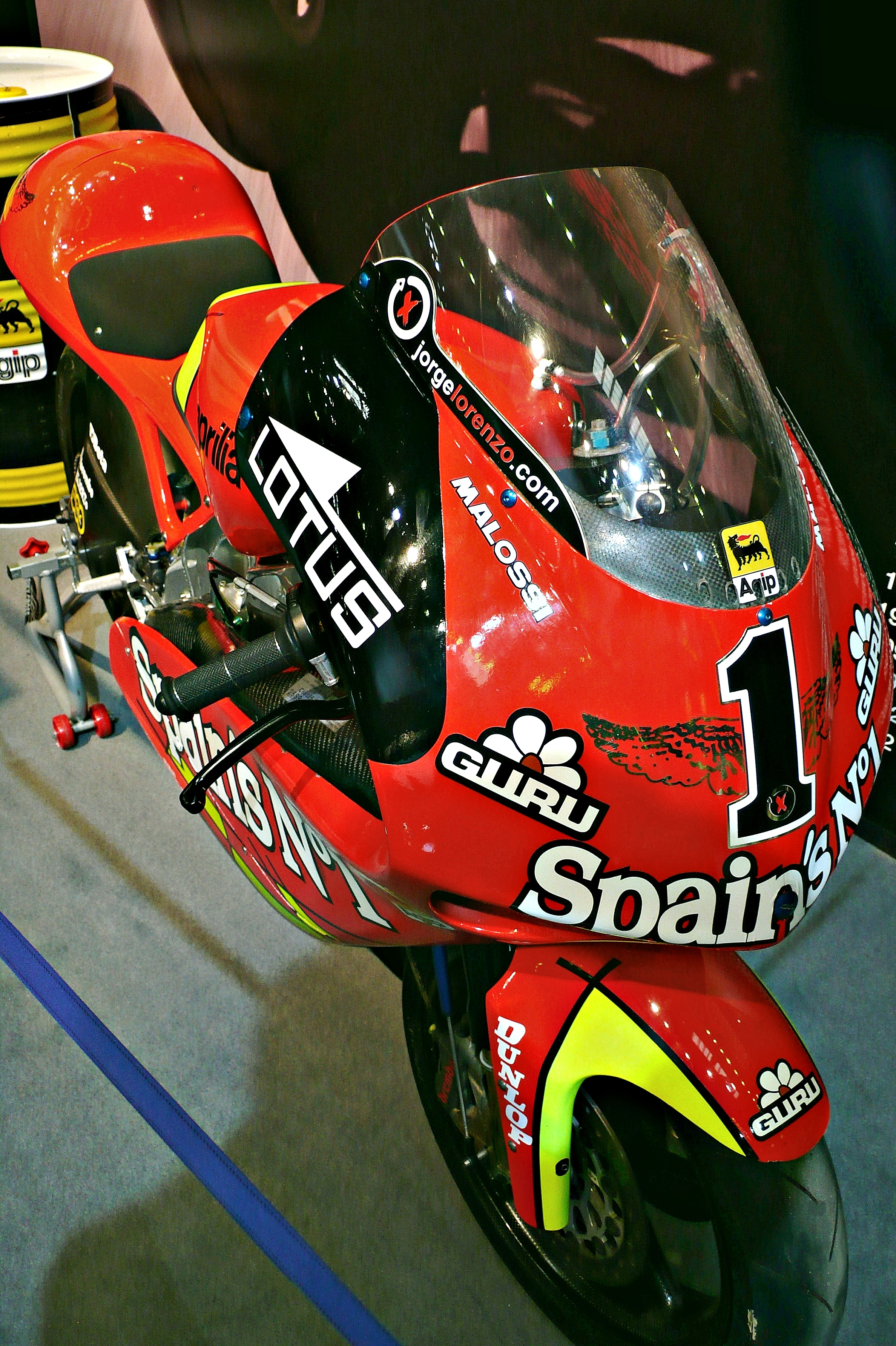 aprilia jorge lorenzo salon de barcelona-2006